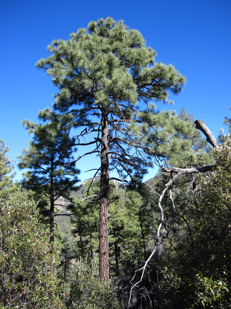 Apache Pine Pinus engelmannii in Chiricahua Mts in SE Arizona